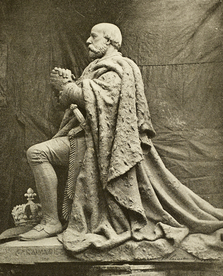 Statue principale du monument de Mr le comte de Chambord à Sainte-Anne d'Auray